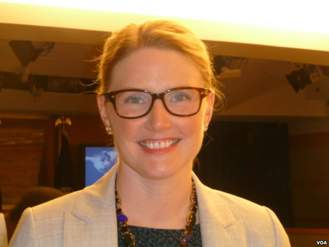 美國國務院副發言人瑪麗·哈夫